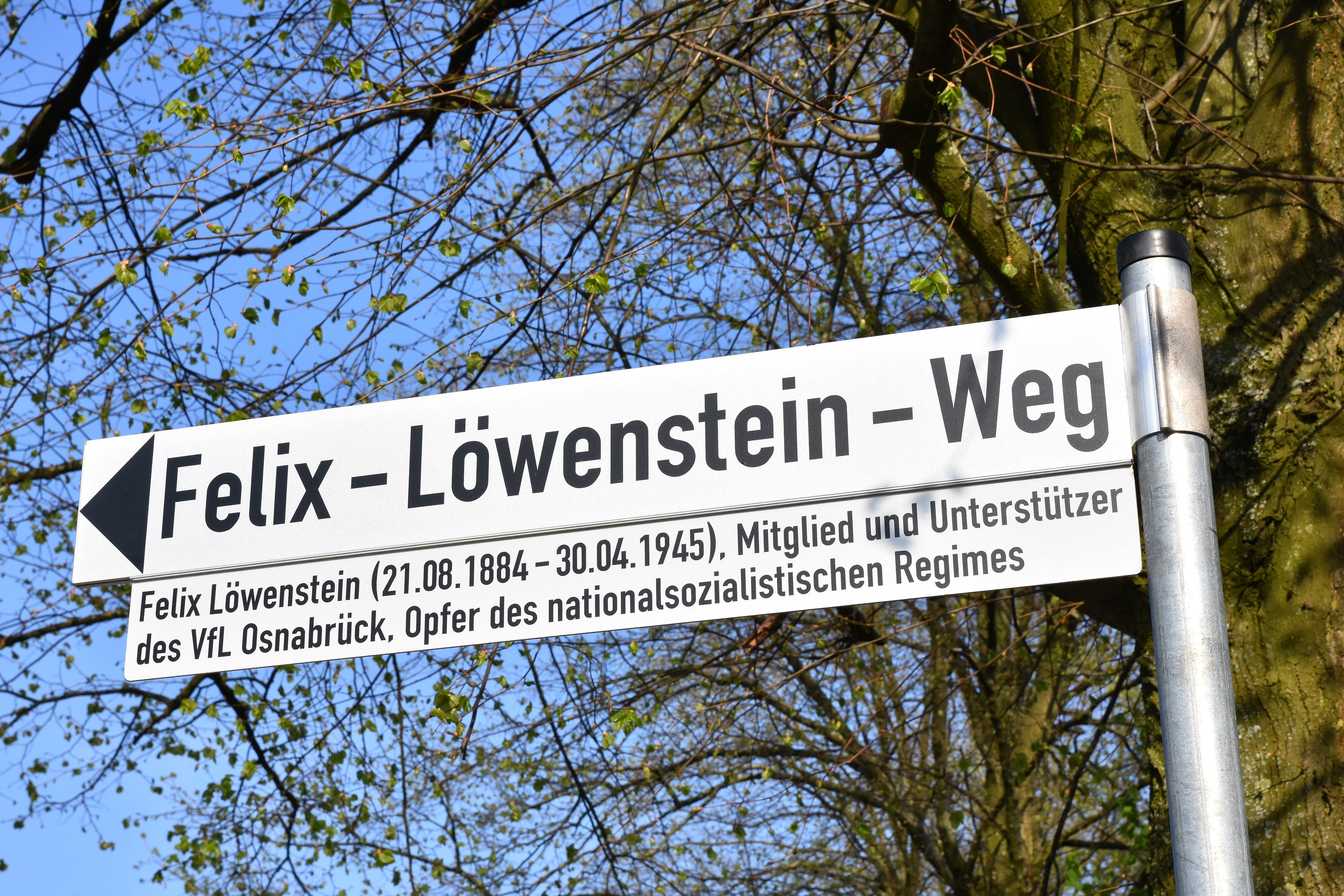 Felix-Löwenstein-Weg am Stadion Bremer-Brücke in Osnabrück. Der VfL Mäzen Felix Löwenstein wurde durch die Nationalsozialisten 1944 ermordet.